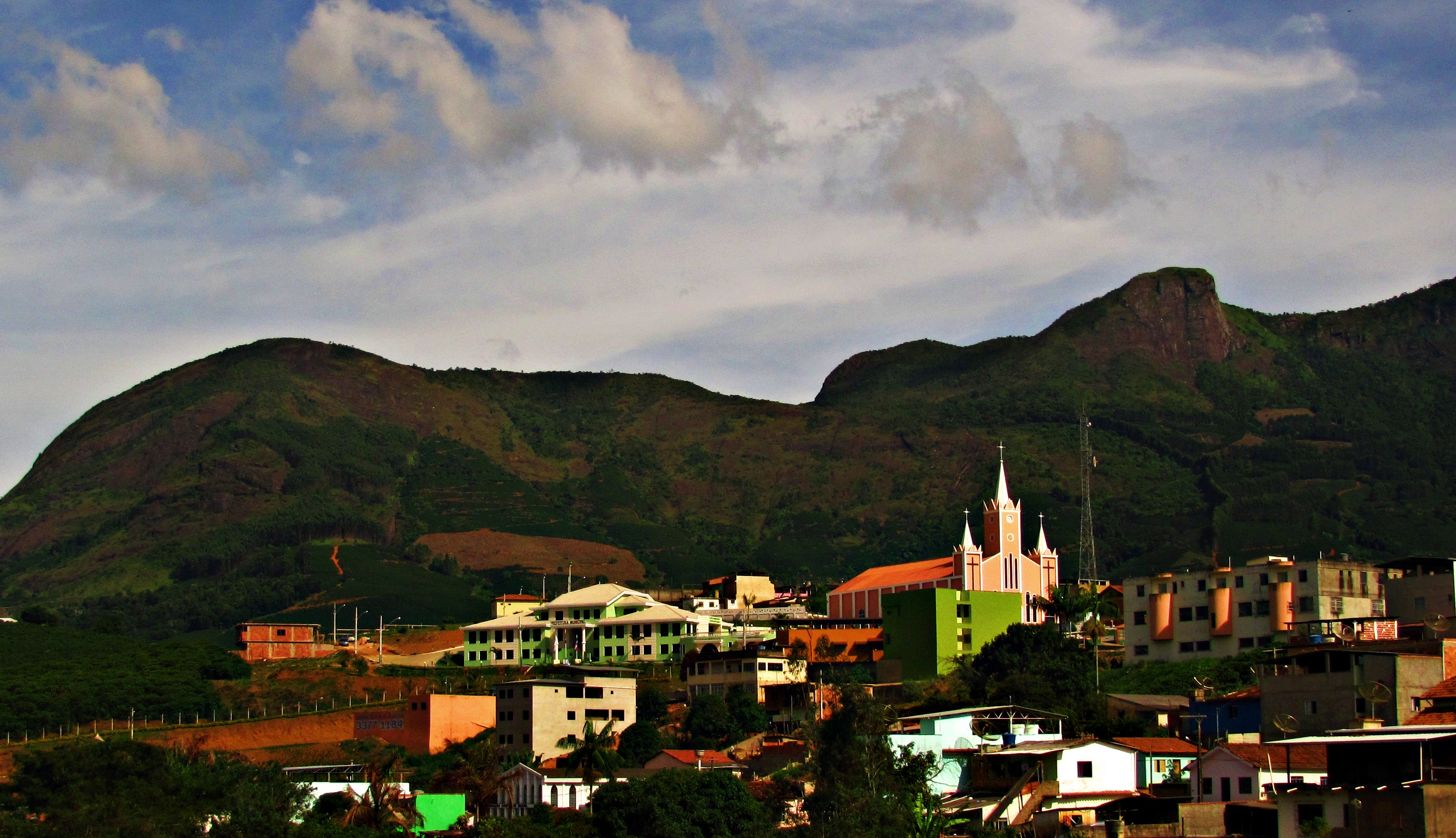 São João do Manhuaçu, vista para o centro da cidade e a Igreja Matriz.